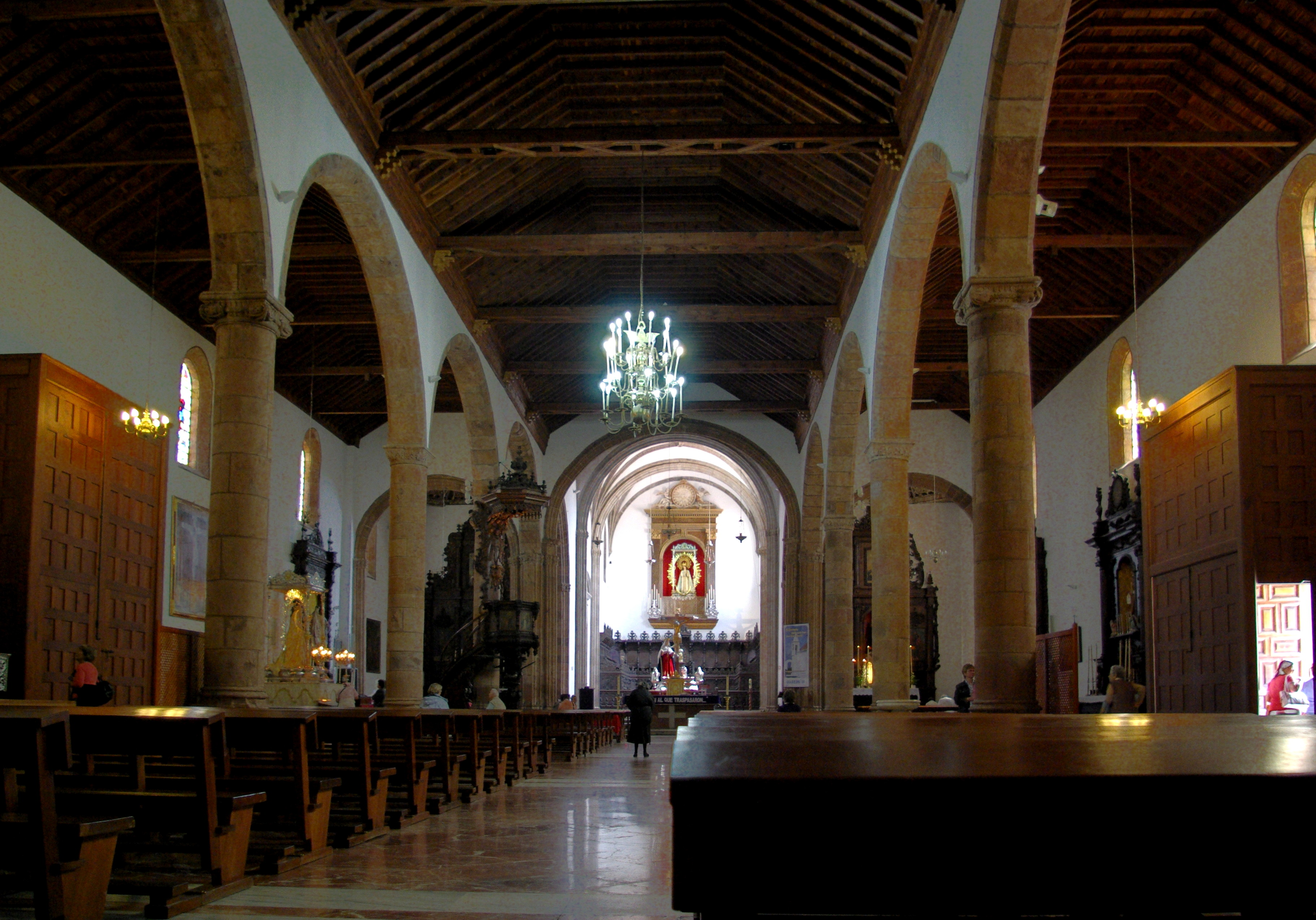 Teneriffa, La Laguna, Iglesia de La Conception